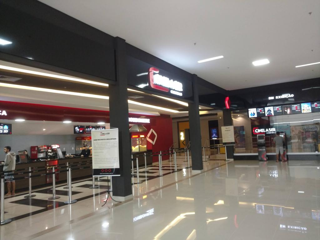 Vista lateral do Cine Laser de Itabaiana